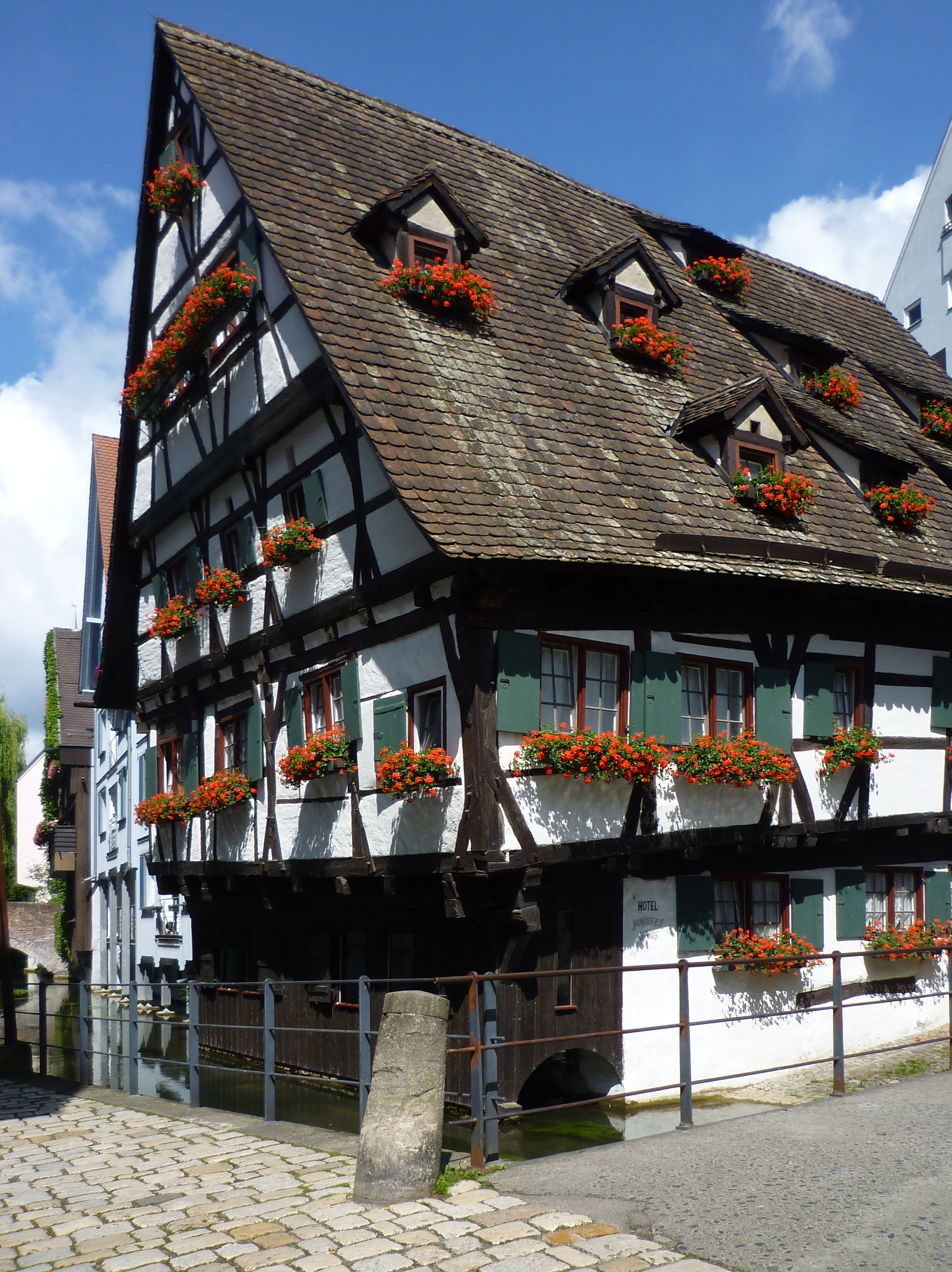 Ulm - das Schiefe Haus an der Blau